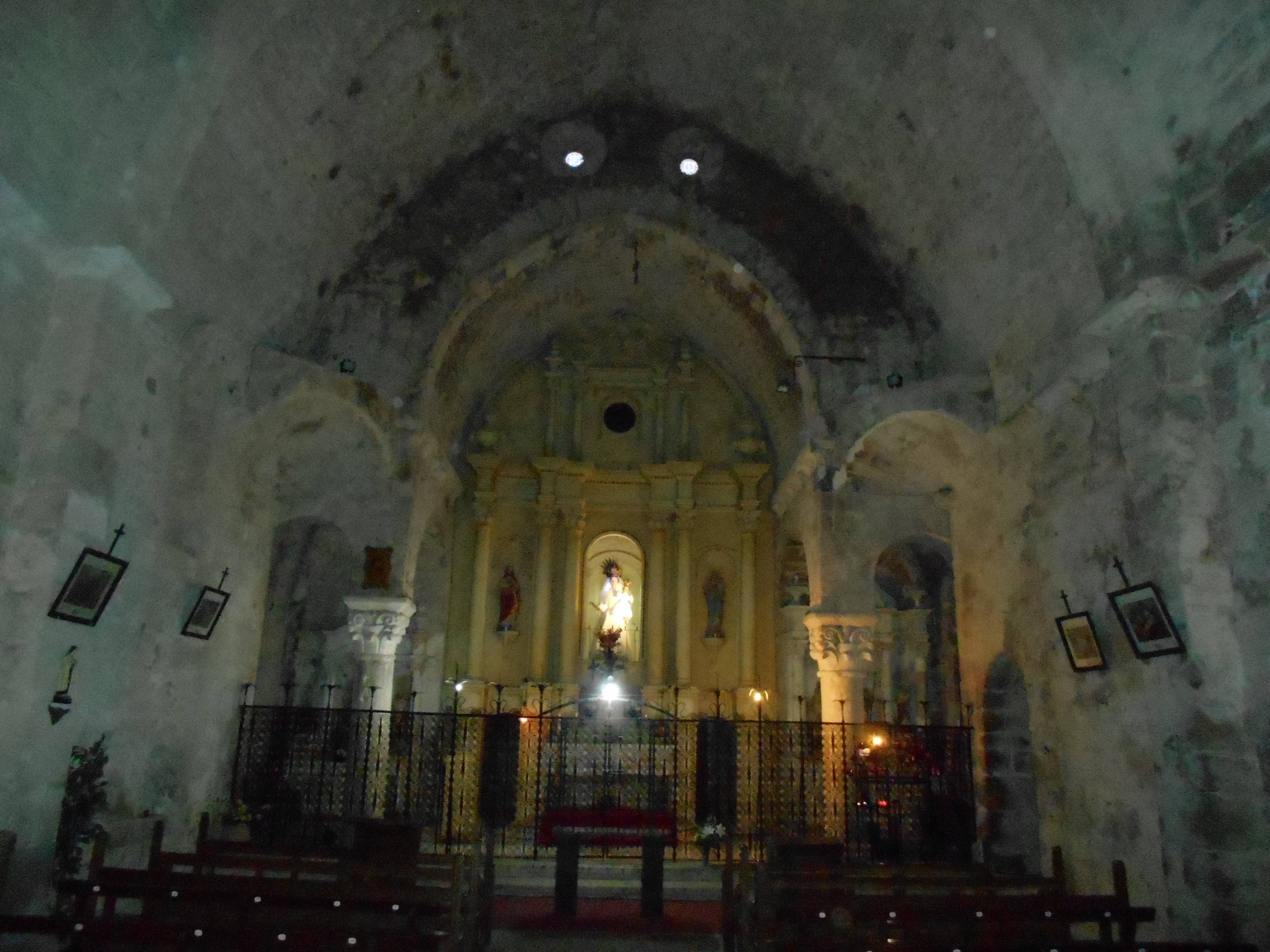 Interior de Santa Maria de Costoja